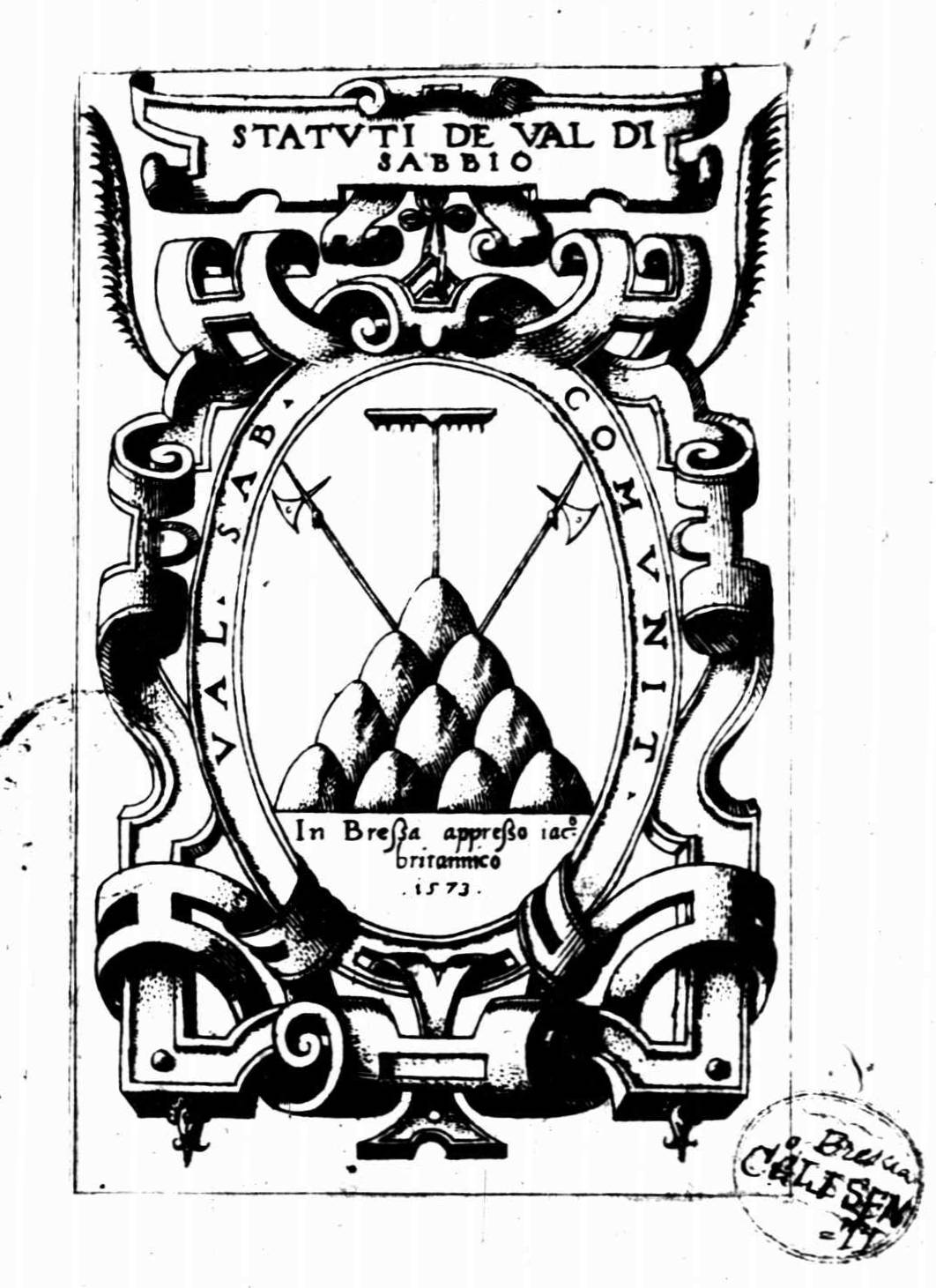 Frontespizio